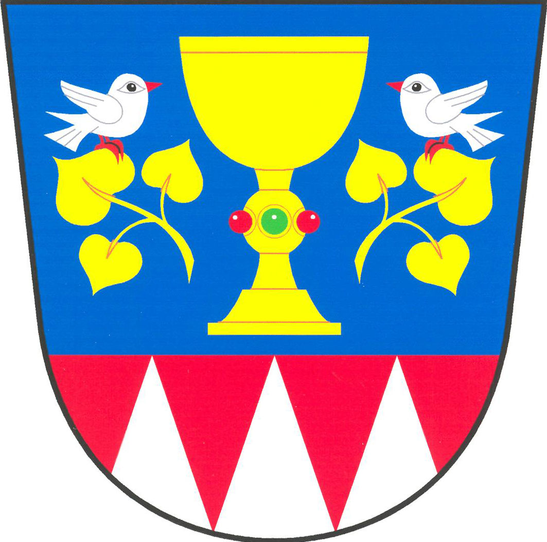 Znak obce Dlouhá Lhota